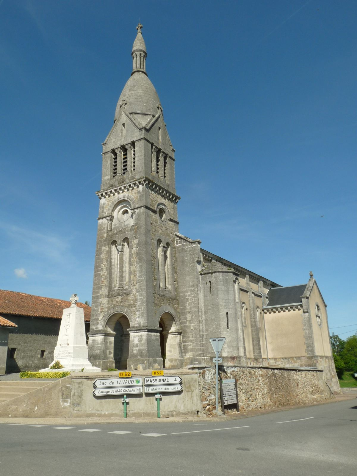 église de Lésignac-Durand, Charente, France